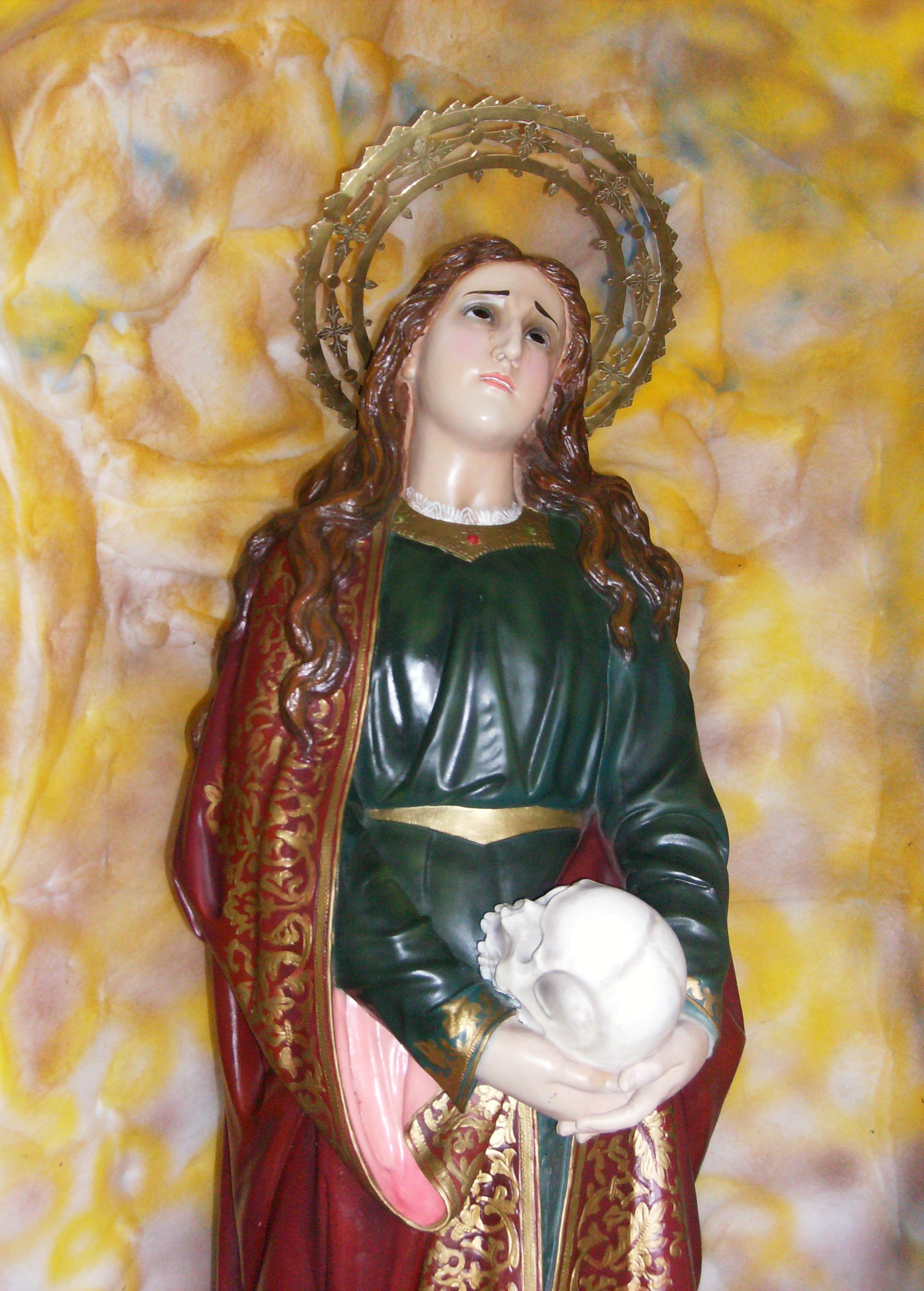 Sta. Maria Magdalena